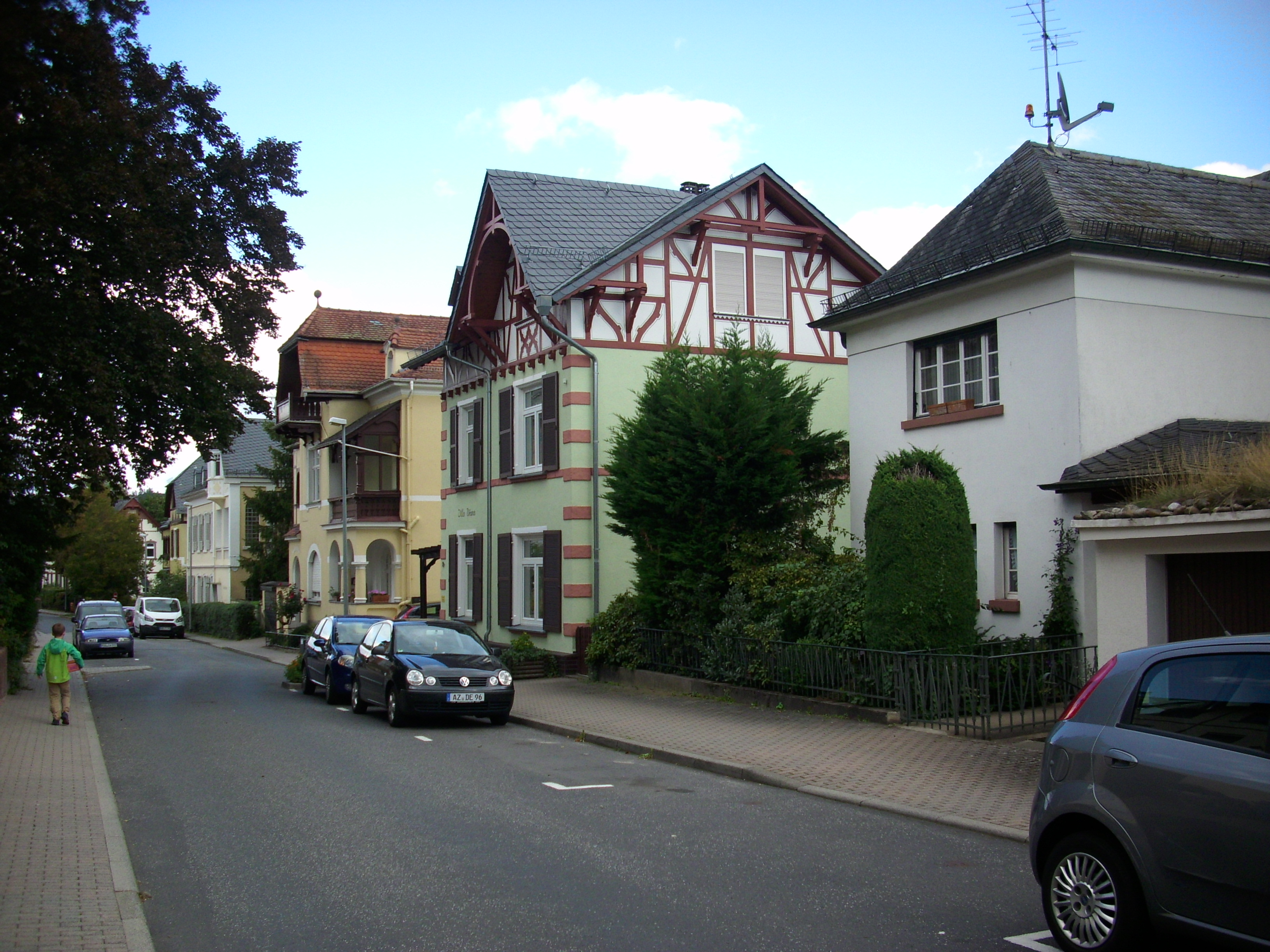 Gesamtanlage Gartenfeldstraße